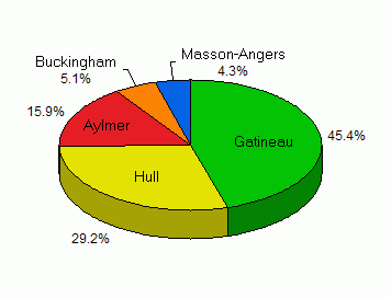 The division of population by sector for the city of Gatineau, Québec, Canada. La division de la population, par secteur, de la Ville de Gatineau, Québec, Canada.